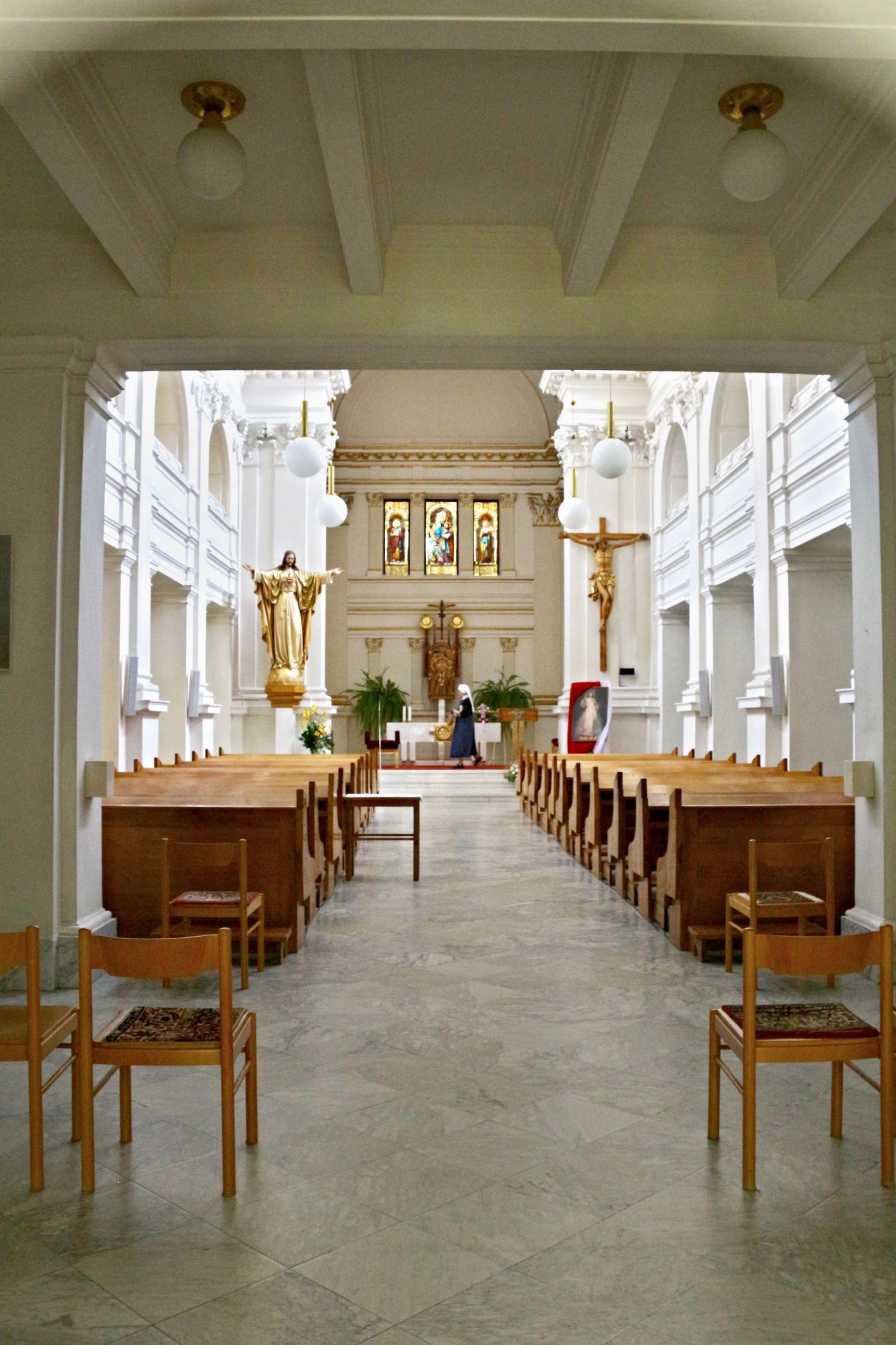 Brno Klášter milosrdných sester a kostel svaté Rodiny